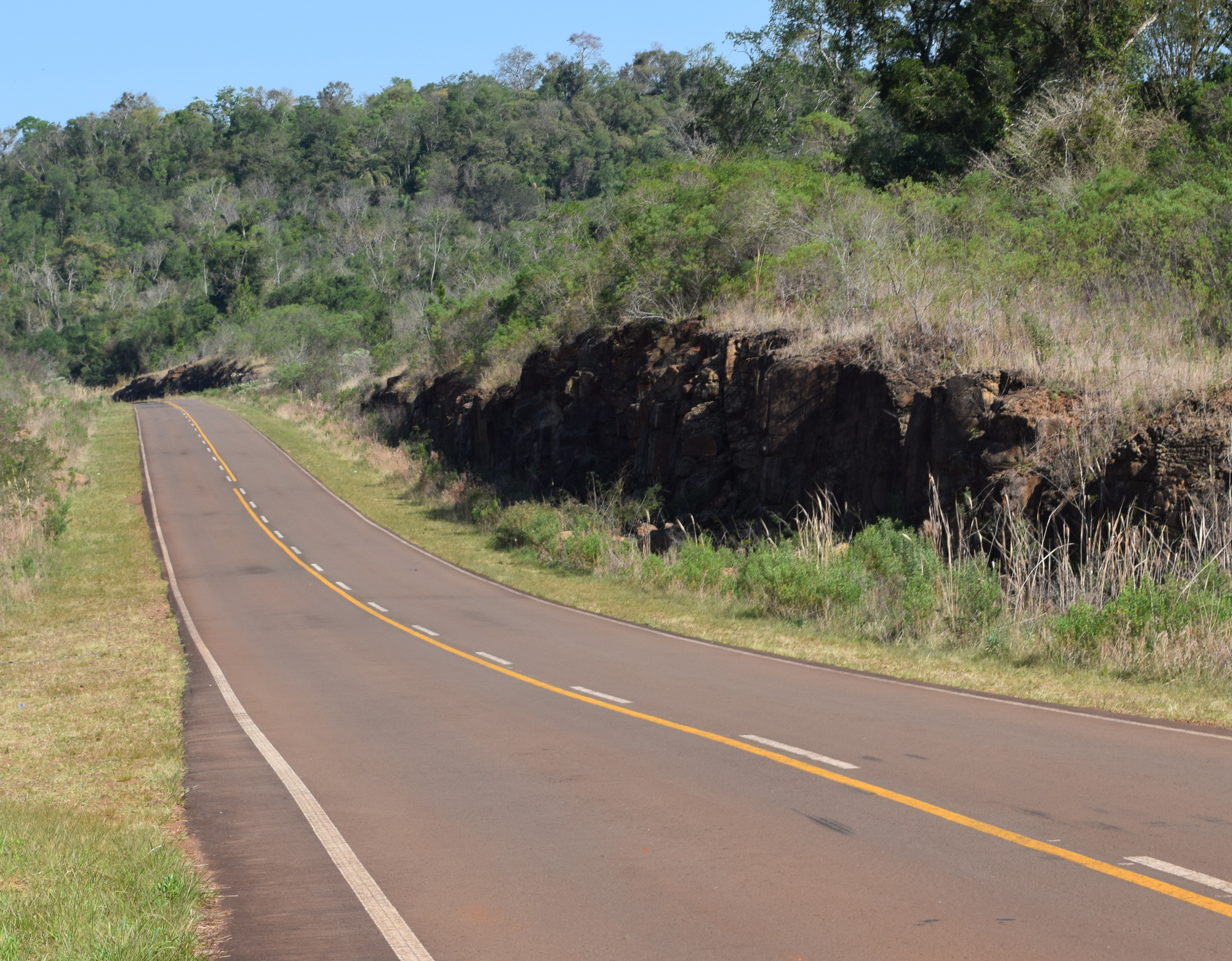 La ruta provincial n° 5 en la provincia de Misiones.